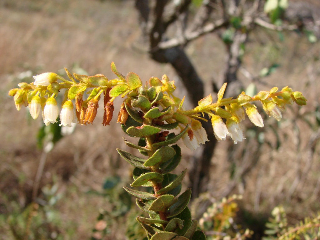 Agarista virgata - ERICACEAE - Espécie endêmica de Minas Gerais - Parque Estadual do Biribiri - Serra do Espinhaço - Diamantina - Minas Gerais - Brasil.